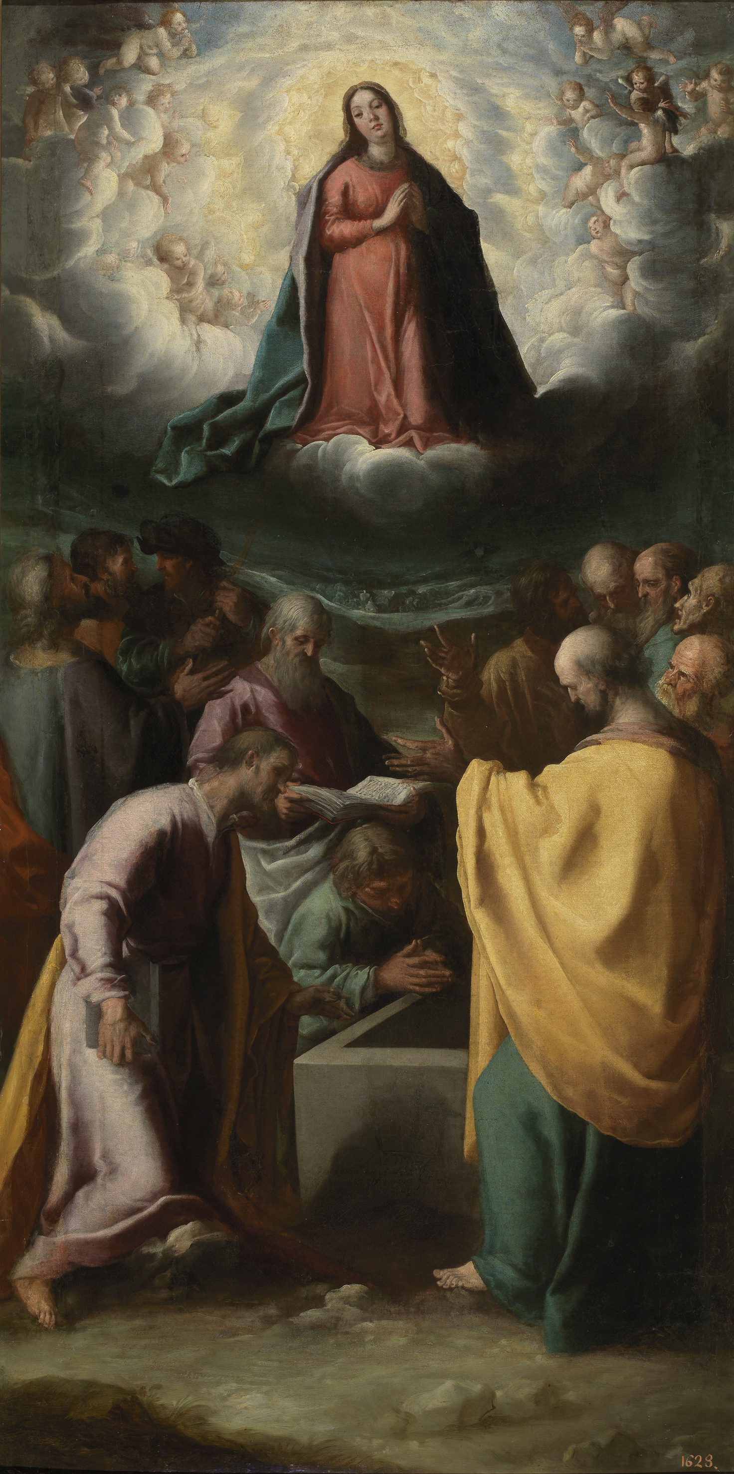 La obra representa la Asunción de la Virgen María en cuerpo y alma a los Cielos. Obra muy significativa del gusto de Cajés por su colorido refinado, las formas de sus figuras son aún manieristas siendo su técnica libre y suelta. El rompimiento luminoso, en el que sitúa la corona de ángeles que hacen coro a la Virgen, evoca su paso por Italia y el contacto que pudo tener con artistas del ambiente clasicista próximos a Lanfranco. En ella también aparecen sus característicos angelotes rollizos y mofletudos y la mórbida suavidad con la que modela sus figuras, tiñendo siempre sus rostros de una lechosa blancura que recuerda métodos próximos a Correggio, artista por el que debió sentir especial interés, según se desprende de alguna copia excelente que pintó. Según la fecha que aparece, sería la primera obra conocida de su extensa produción.